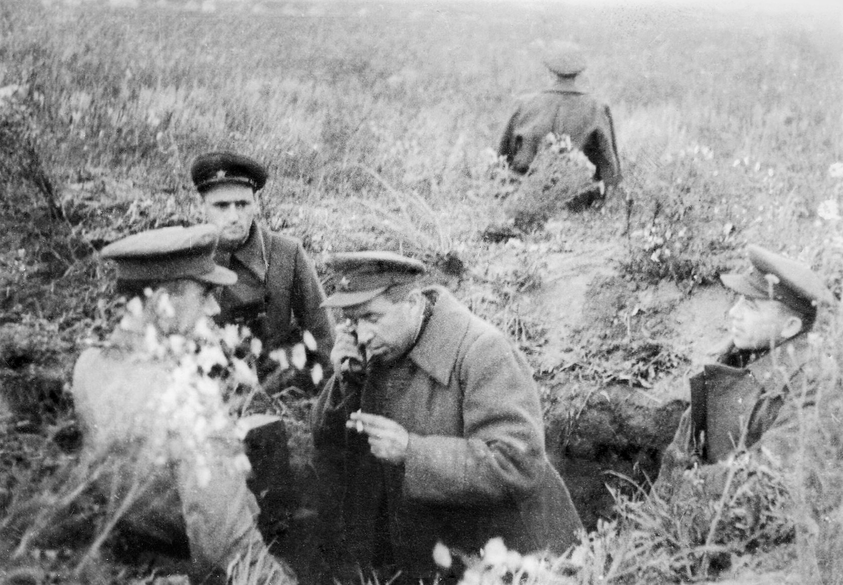 Командир 44-й гвардейской танковой бригады Иосиф Гусаковский у полевого телефона